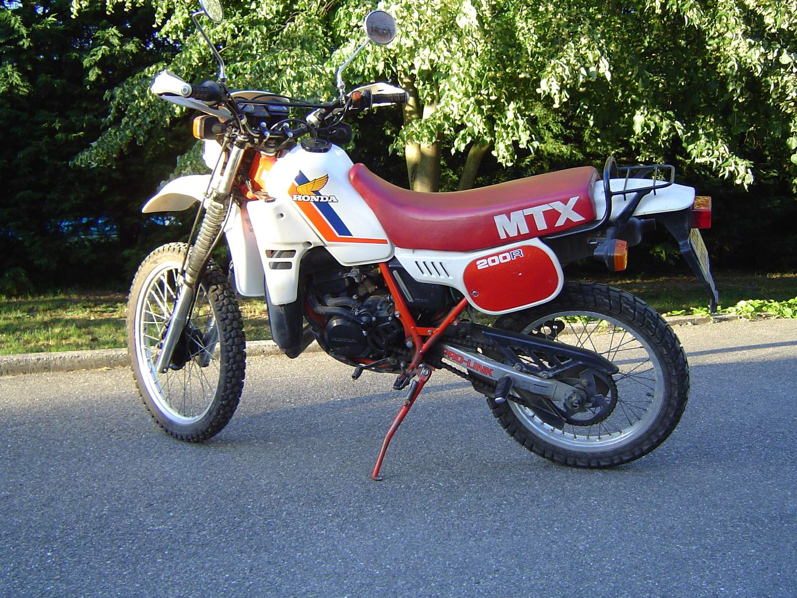 Honda MTX 200 R vue de côté à Mackenheim (Bas-Rhin, France).